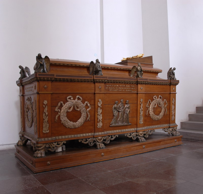 Tombe in de kapel van Frederik VII